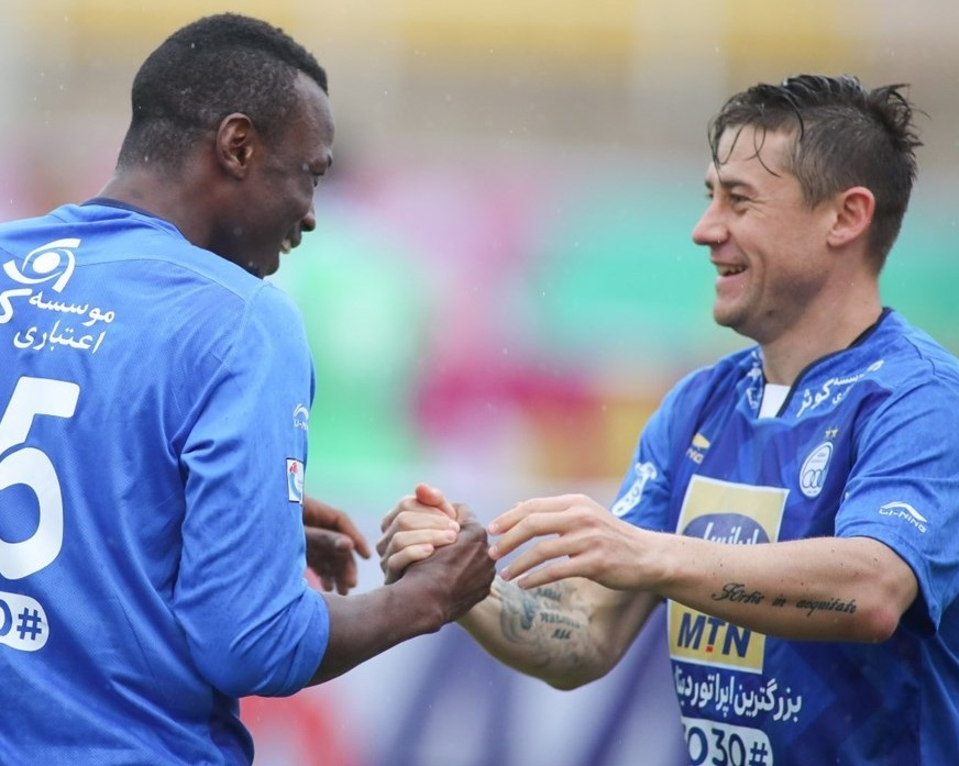 گزارش تصویری خبرگزاری فارس از بازی استقلال تهران و فولاد خوزستان در ۵ اسفند ۱۳۹۶